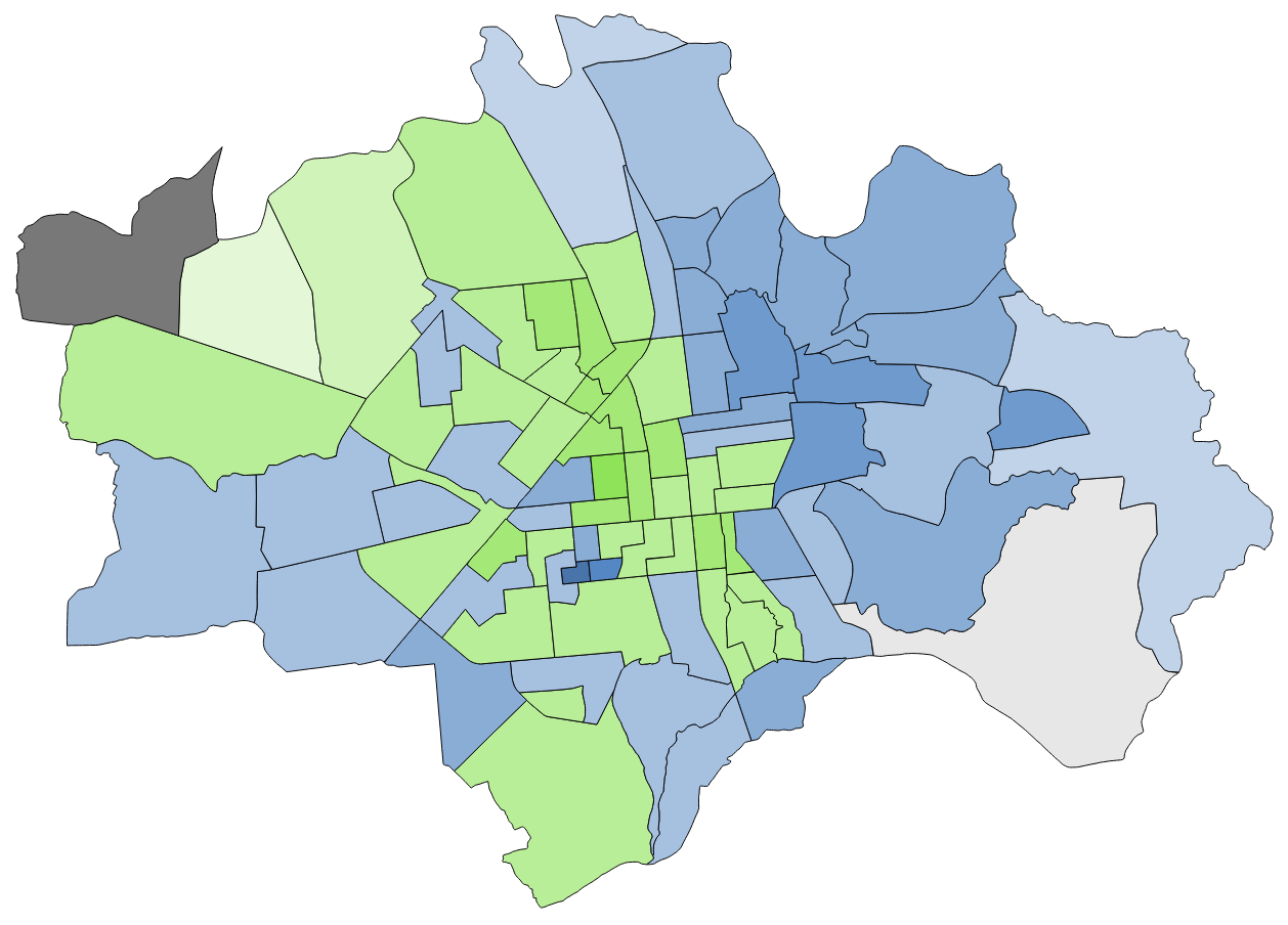 顏色對照表